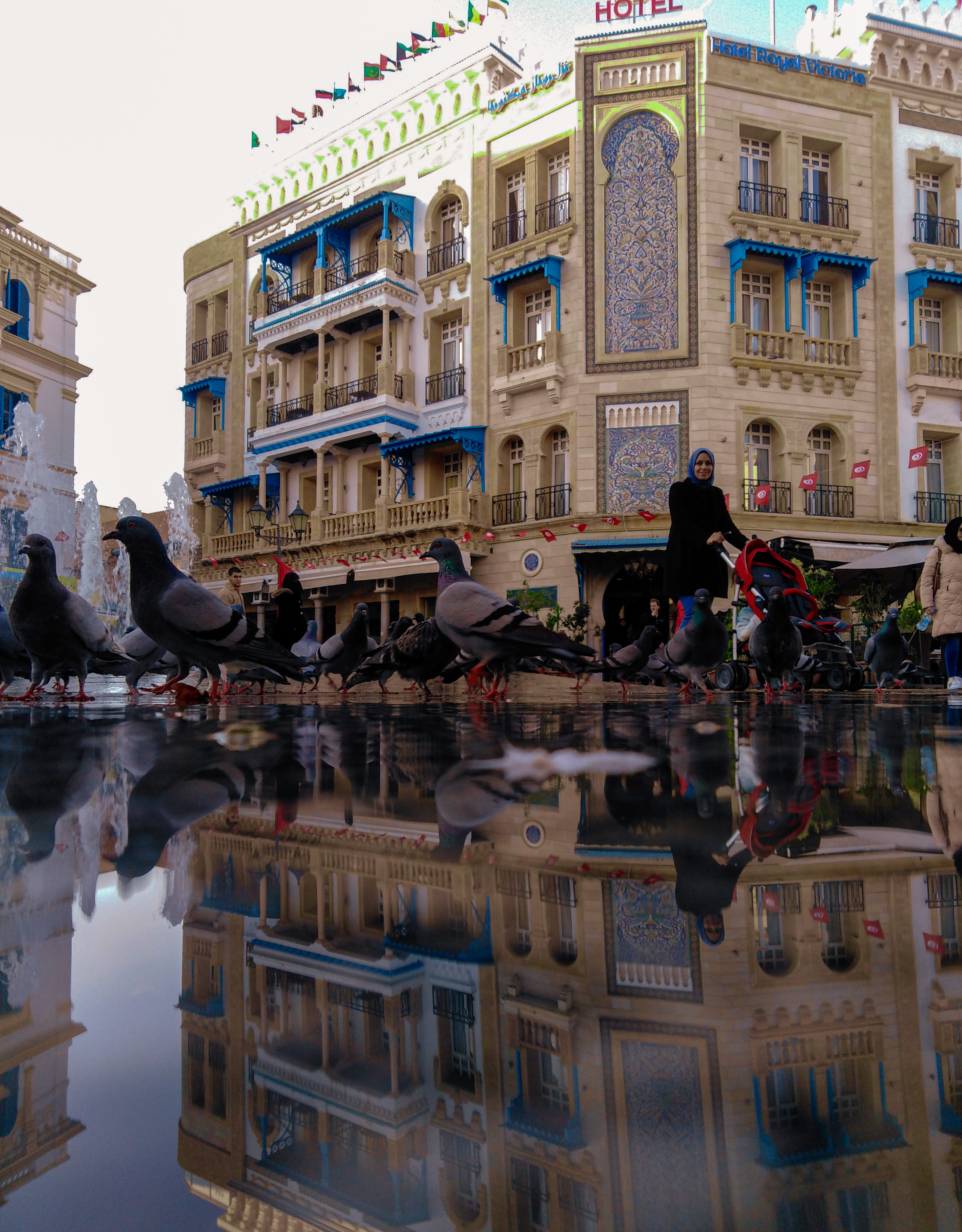 ساحة باب البحر أو بما يعرف بباب فرنسا.. This is an image with the theme "Africa on the Move or Transport" from: Tunisia